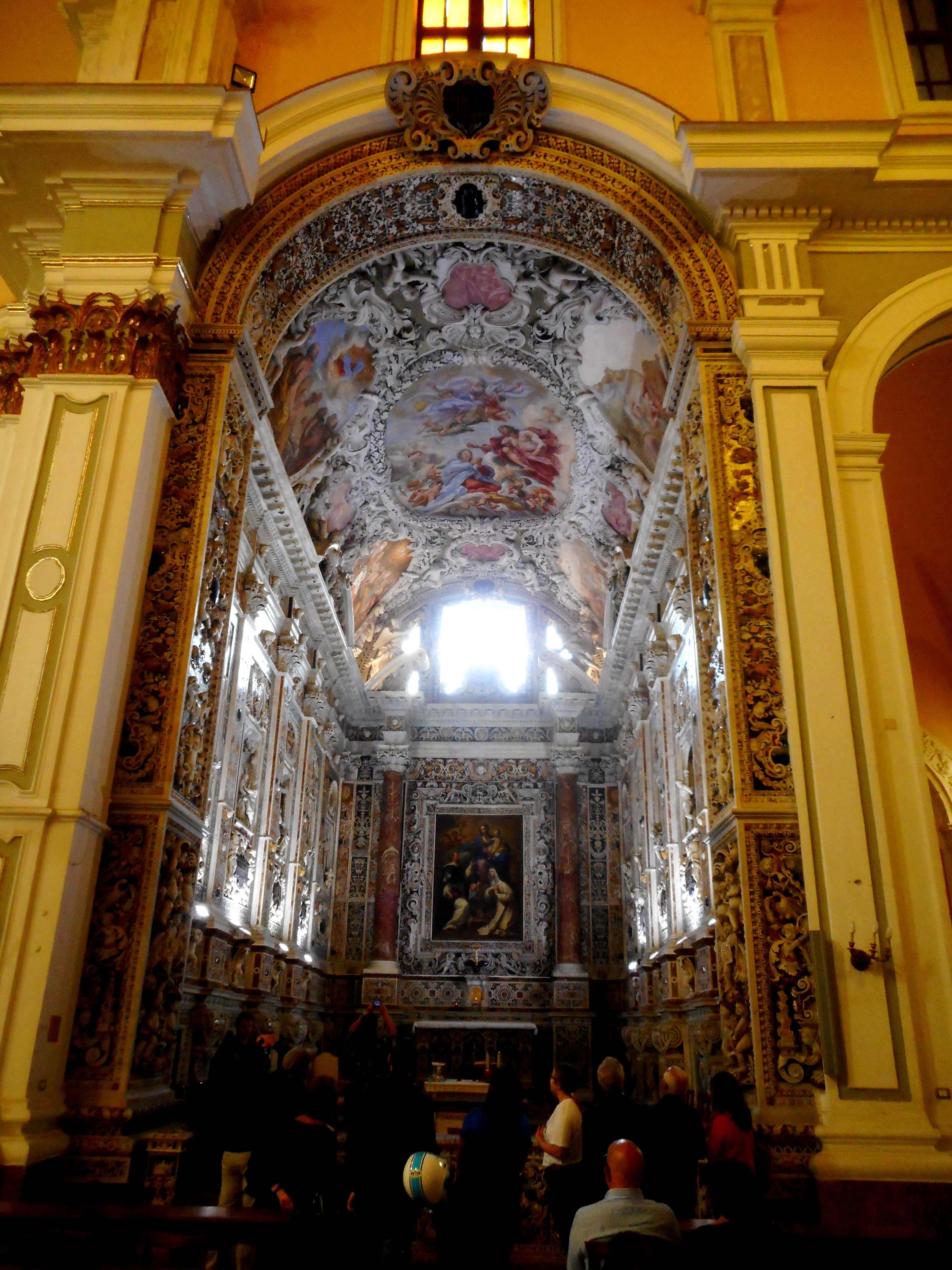 Cappella della Madonna del Rosario in Santa Cita